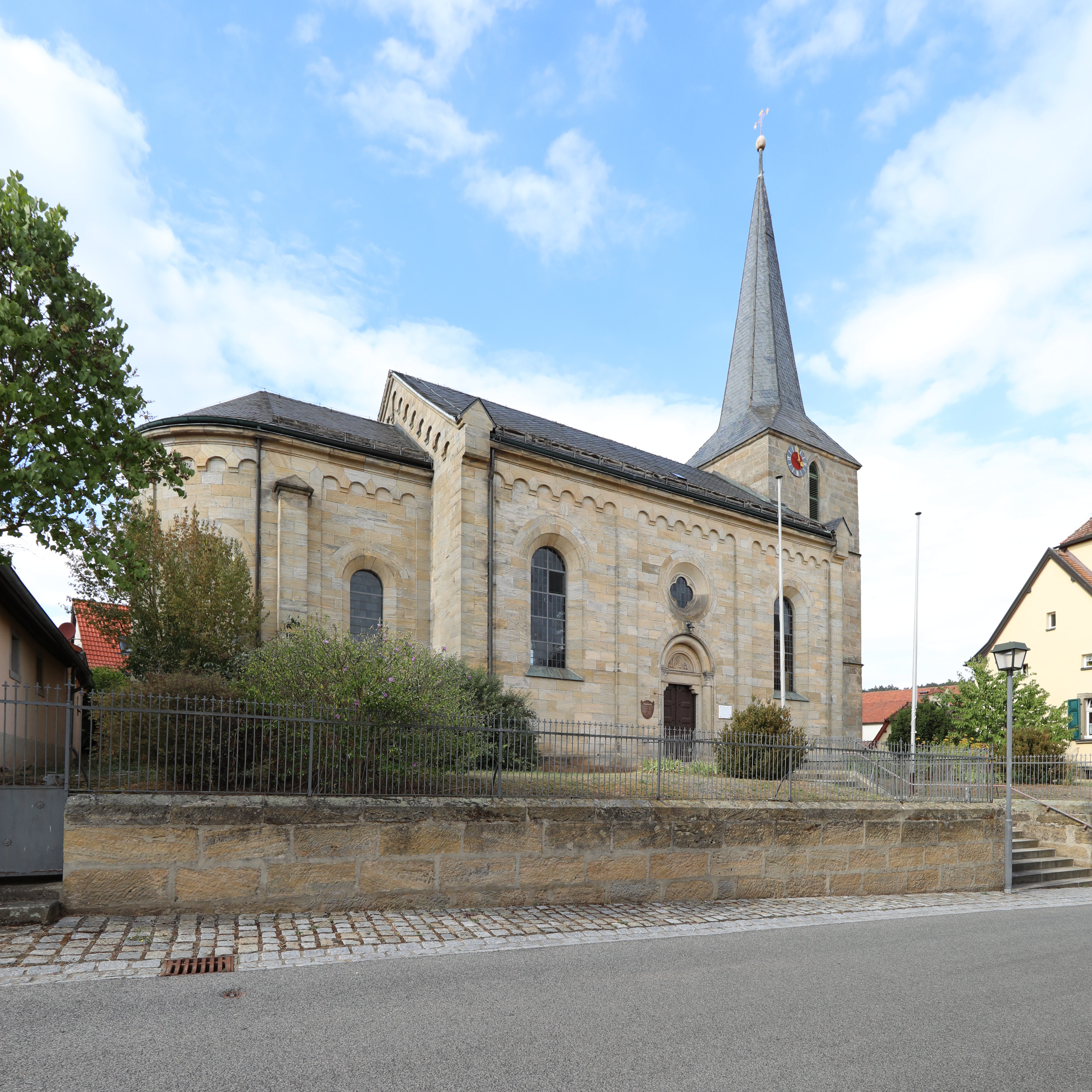 Evangelische Pfarrkirche, Jesserndorf